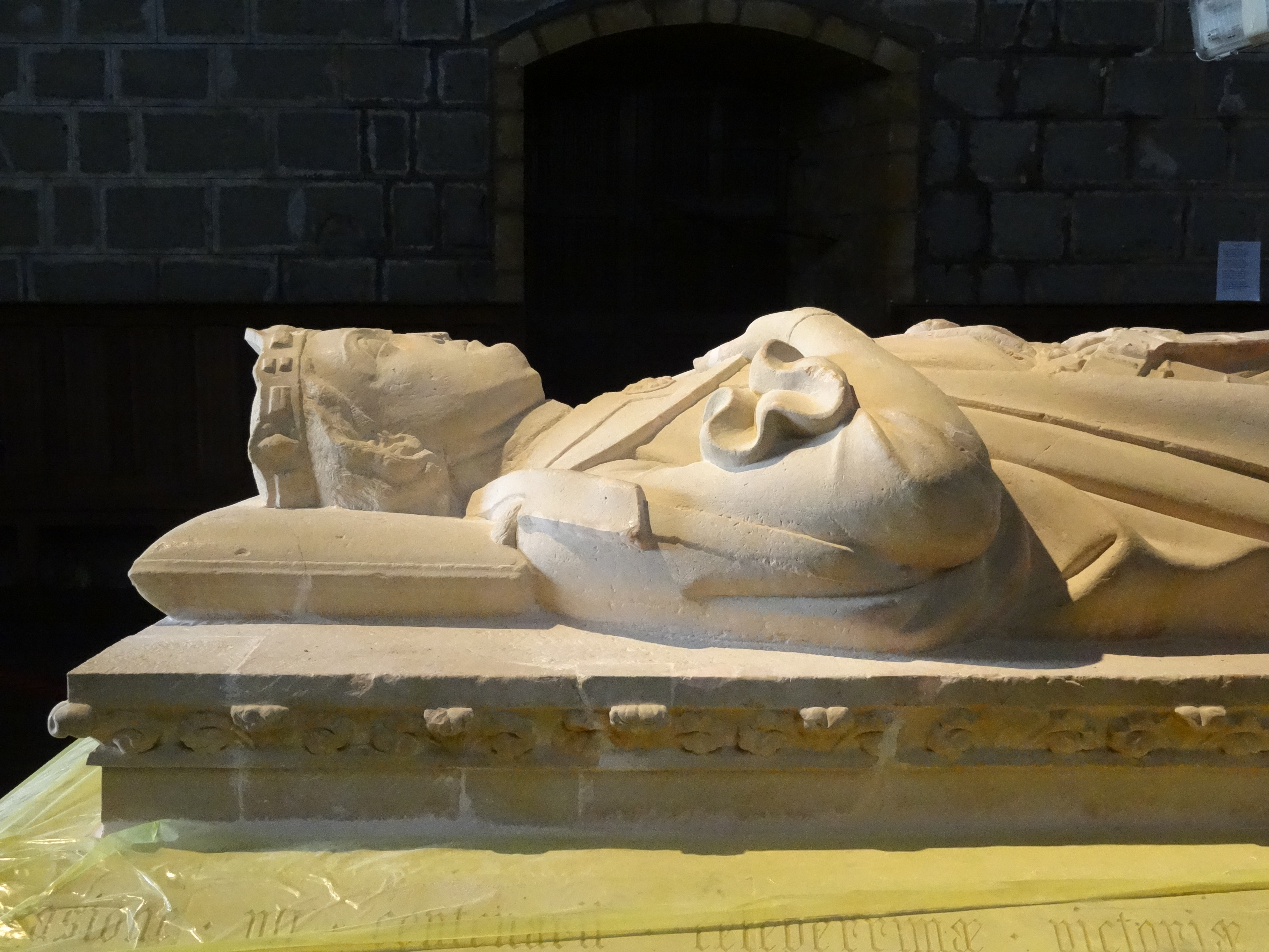 Sepulcro de Sancho VII